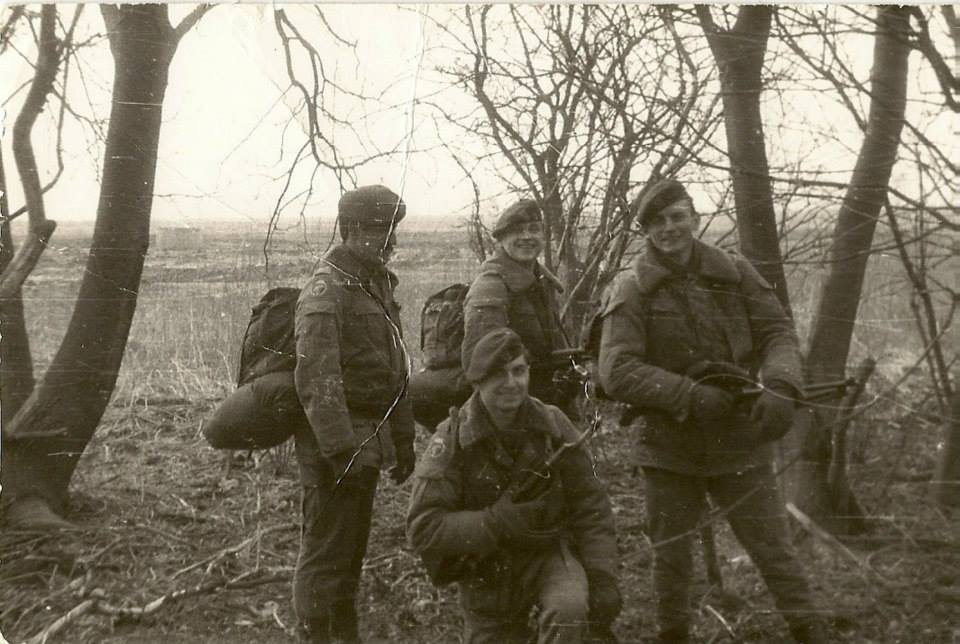 Stargard, 1987. Żołnierze kompanii specjalnej 8br podczas szkolenia